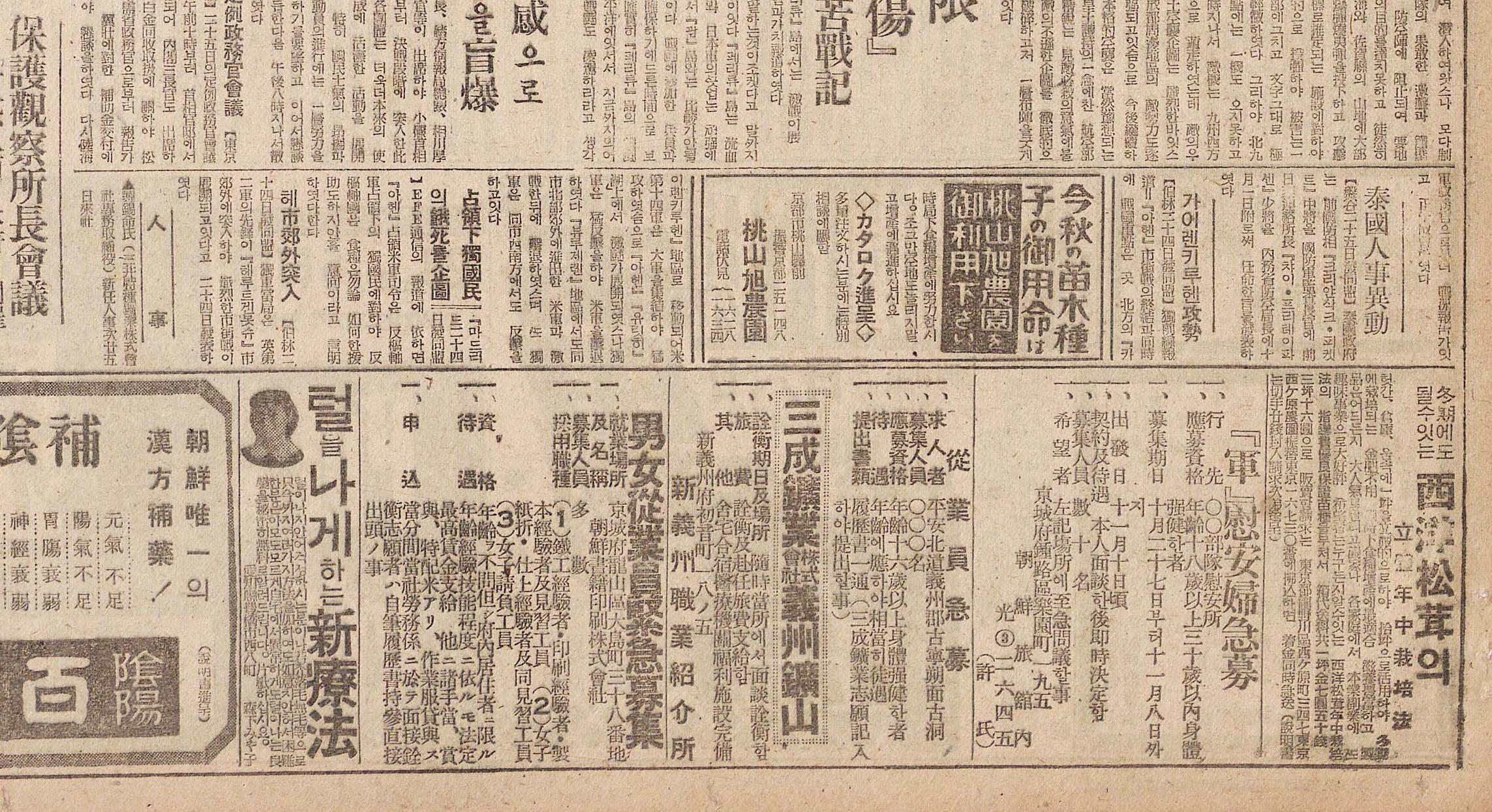 한글과 한자가 혼용(국한문 혼용체)된 1944년 10월 27일자 매일신보 제1면 정치면